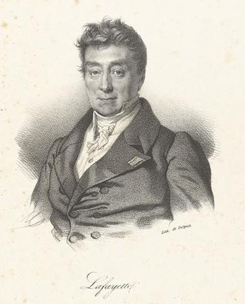 Portrait de Marie Joseph du Motier, marquis de La Fayette (1757-1834), vers 1820.